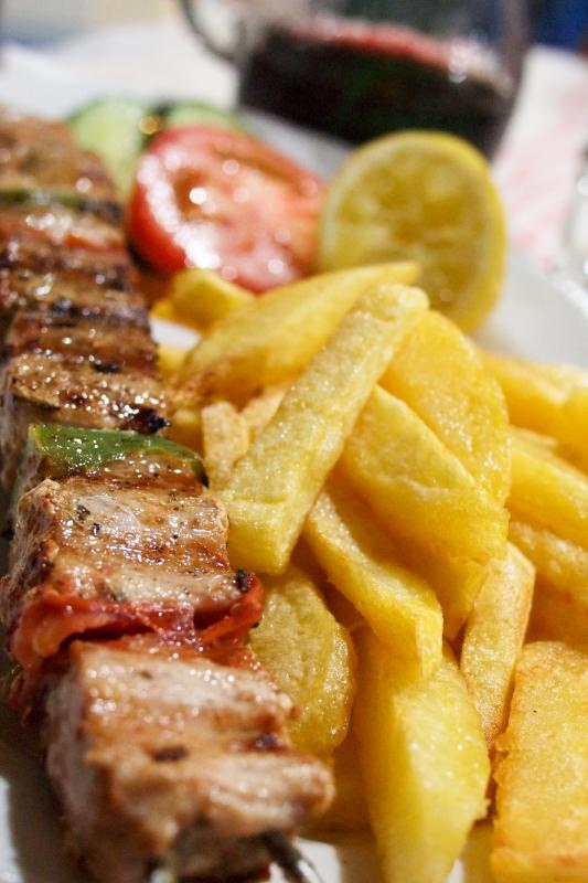 Souvlaki